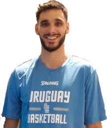 Jugador de basquetbol. Gonzalo Iglesias Fernández.